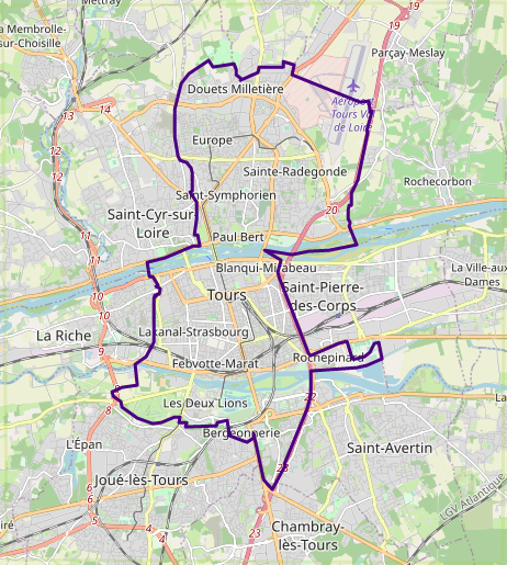 carte réalisée sur umap This map may be incomplete, and may contain errors. Don't rely solely on it for navigation.